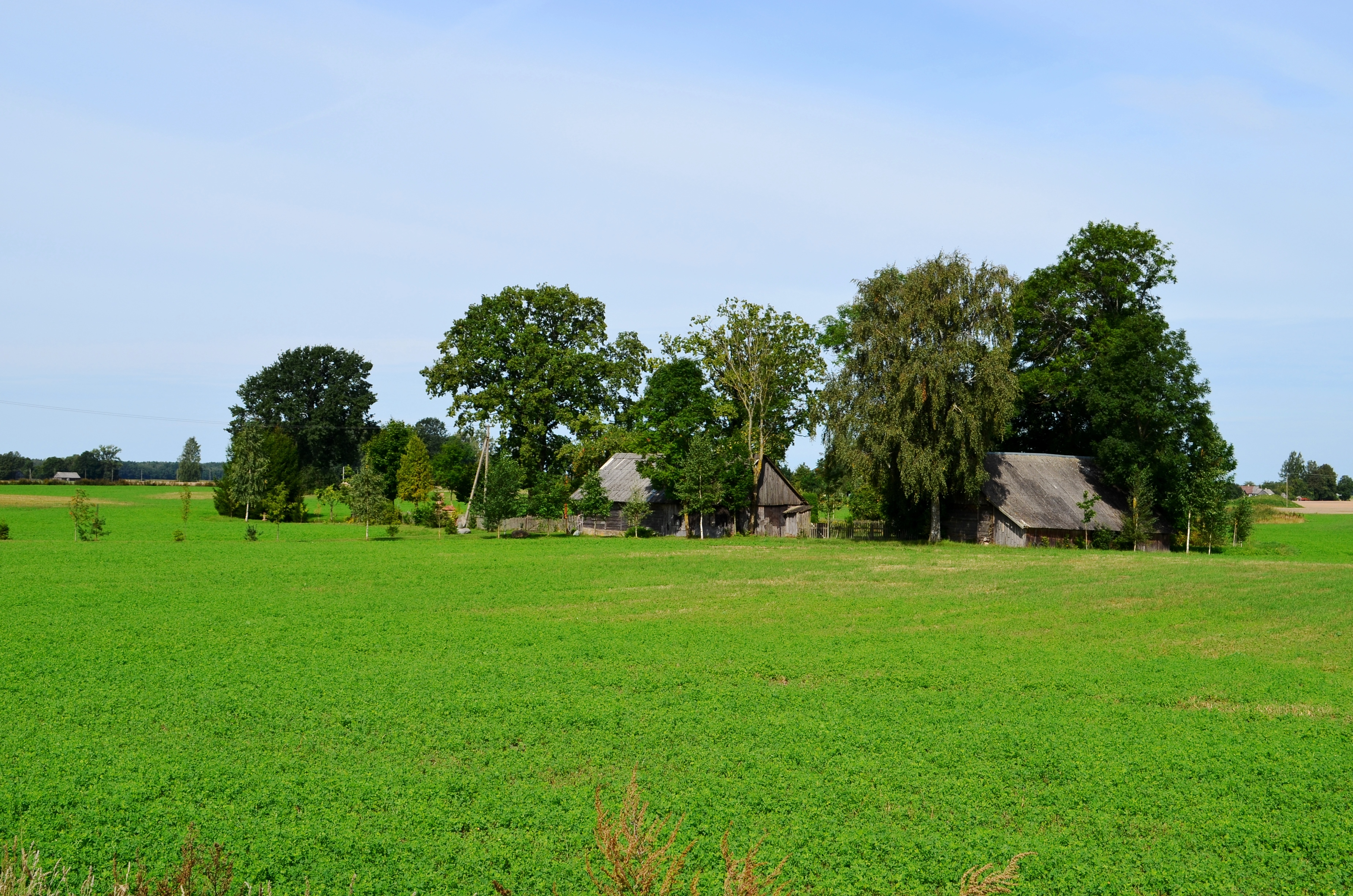 Rusinka, Kazlų Rūdos sav.